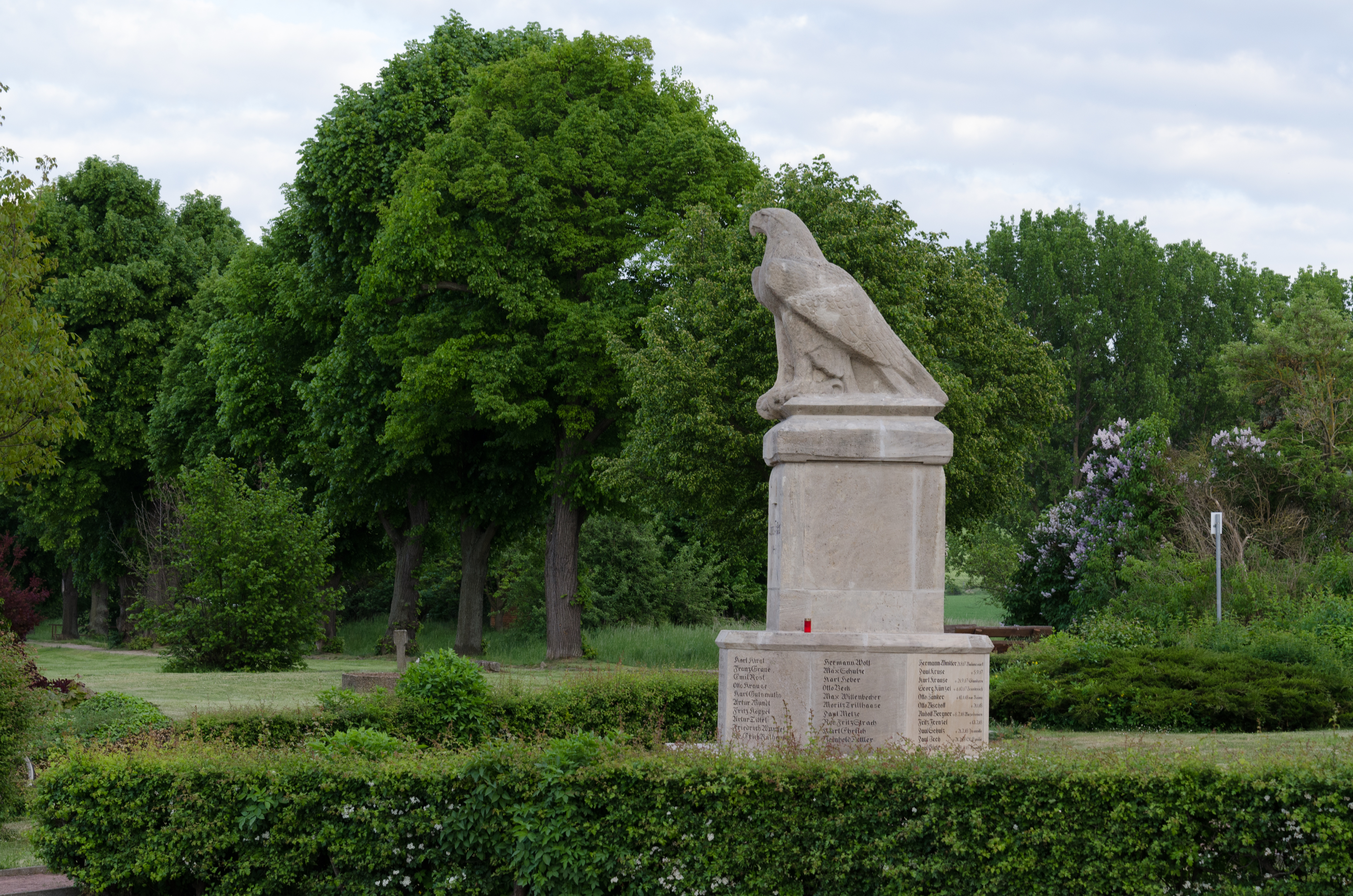 Laucha an der Unstrut, Schützenhausplatz, Kriegerdenkmal